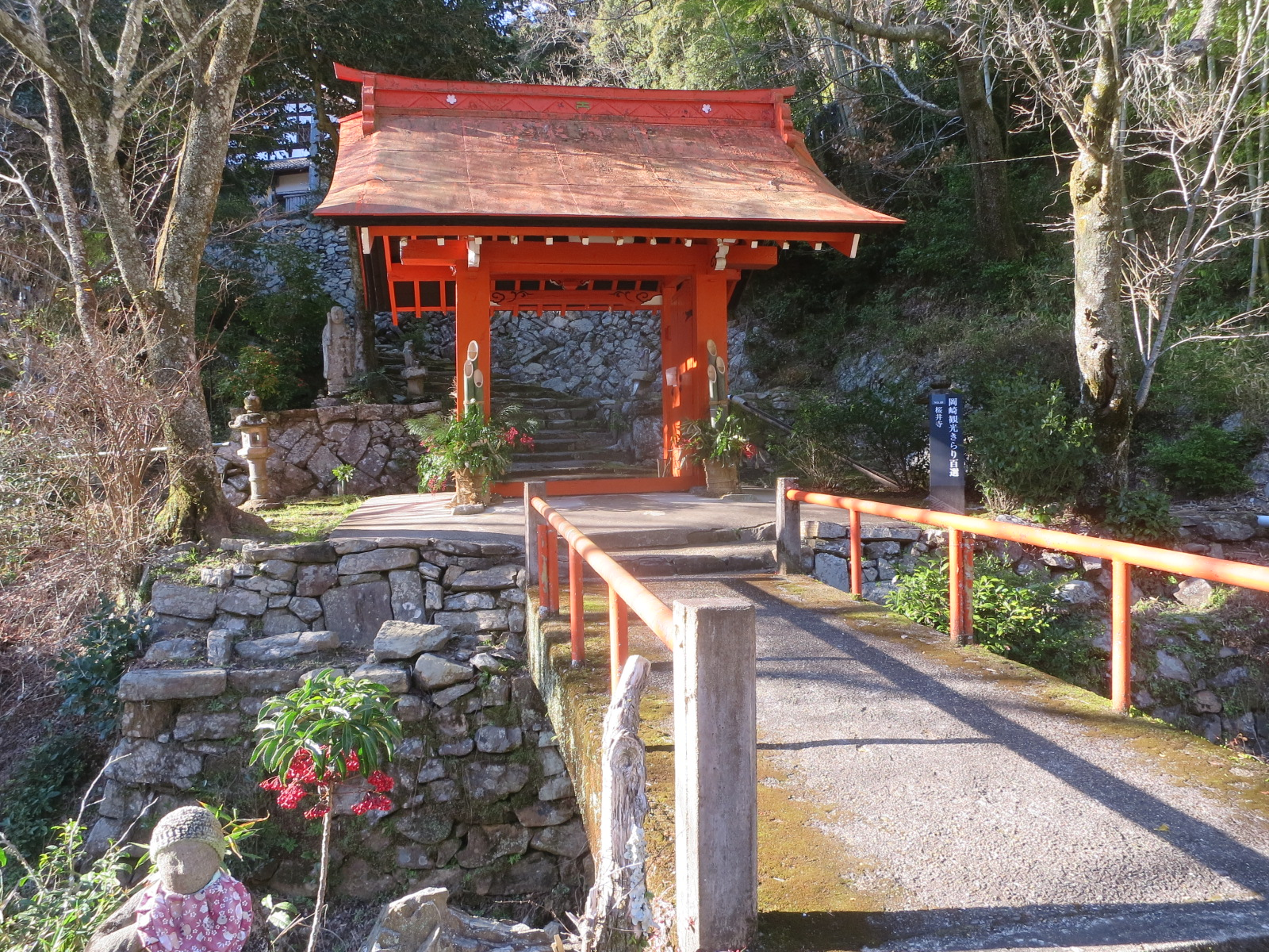 桜井寺（岡崎市桜井寺町）